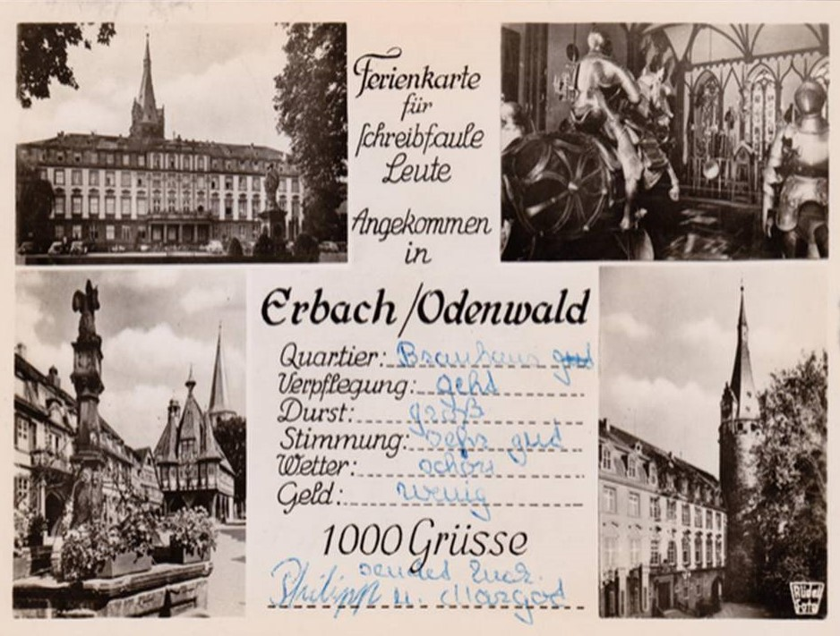 Postkarte von Walter Rüdel, im eigenen Verlag herausgegeben